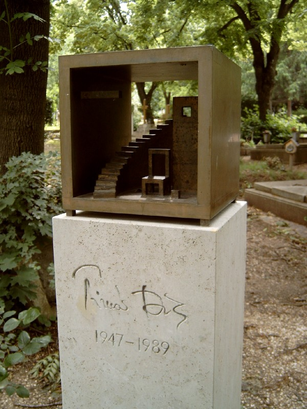 Tímár Béla (Gyula, 1947. okt. 8. – Bp., 1989. febr. 1.) Jászai-díjas (1980)színész, rendező sírja Budapesten. Farkasréti temető: 2/8-1-169. [Szobrász: Gulyás Gyula].